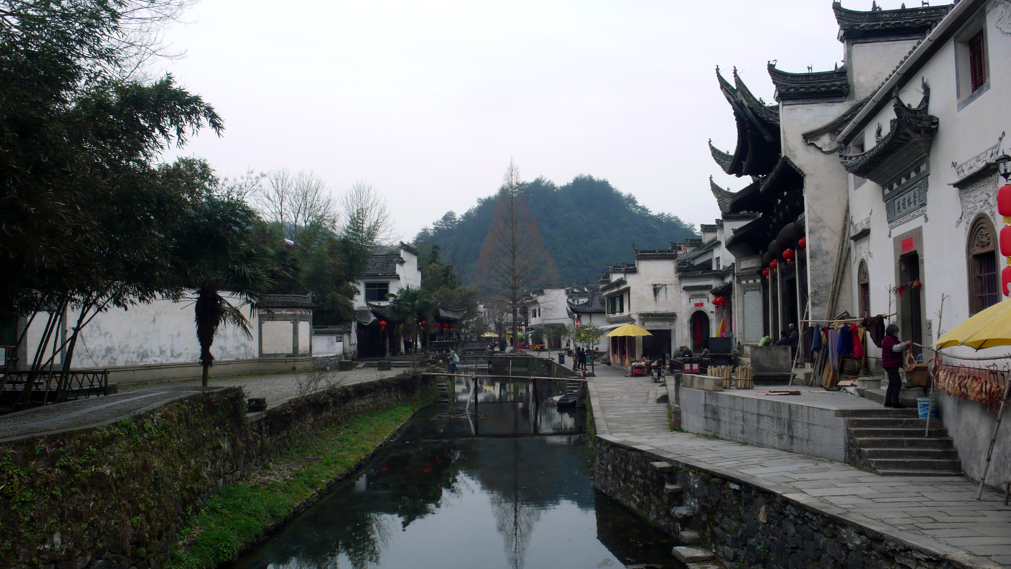 绩溪县龙川村水街。